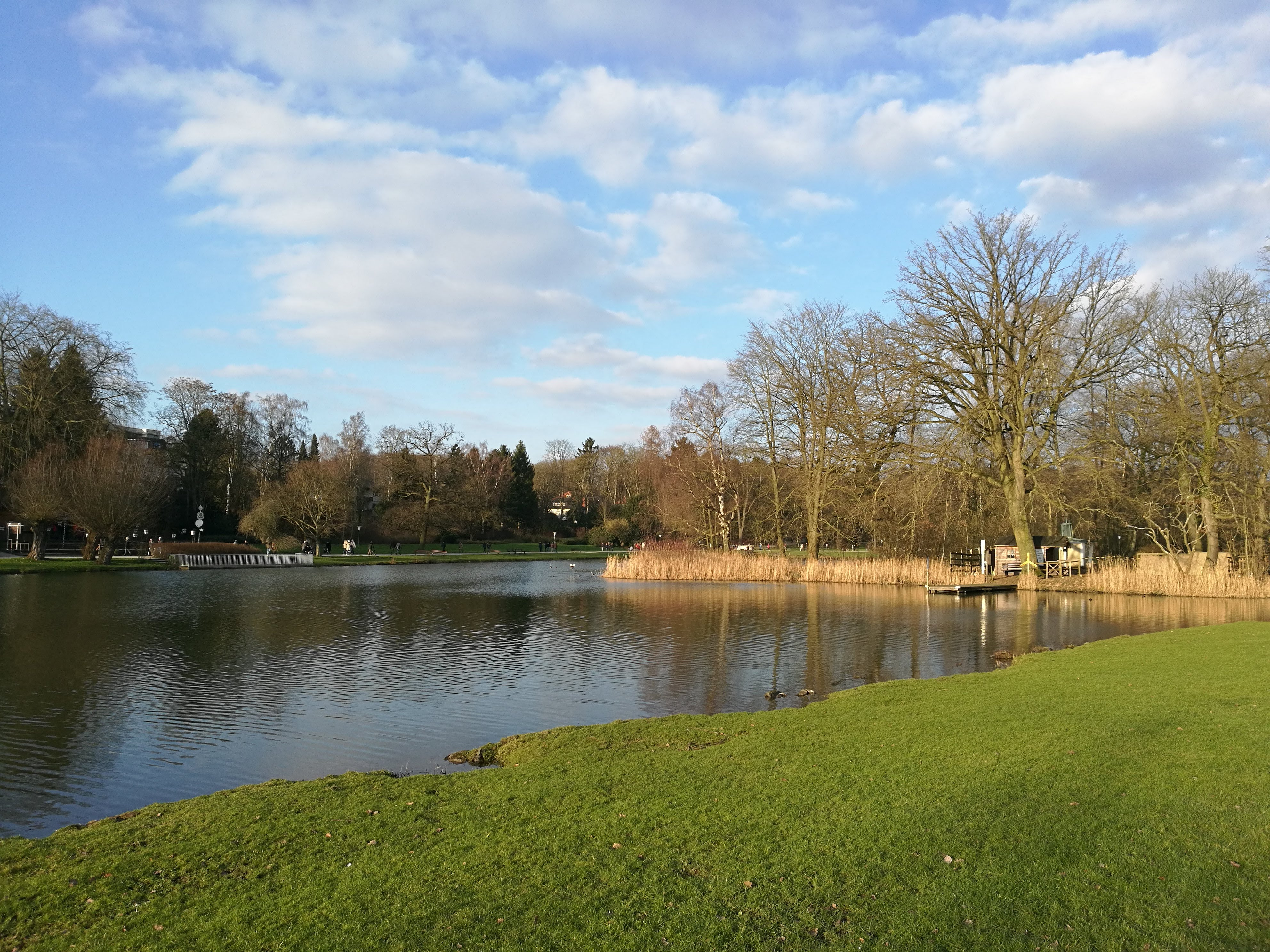 Kurparksee Bad Salzuflen mit Blick auf die Insel